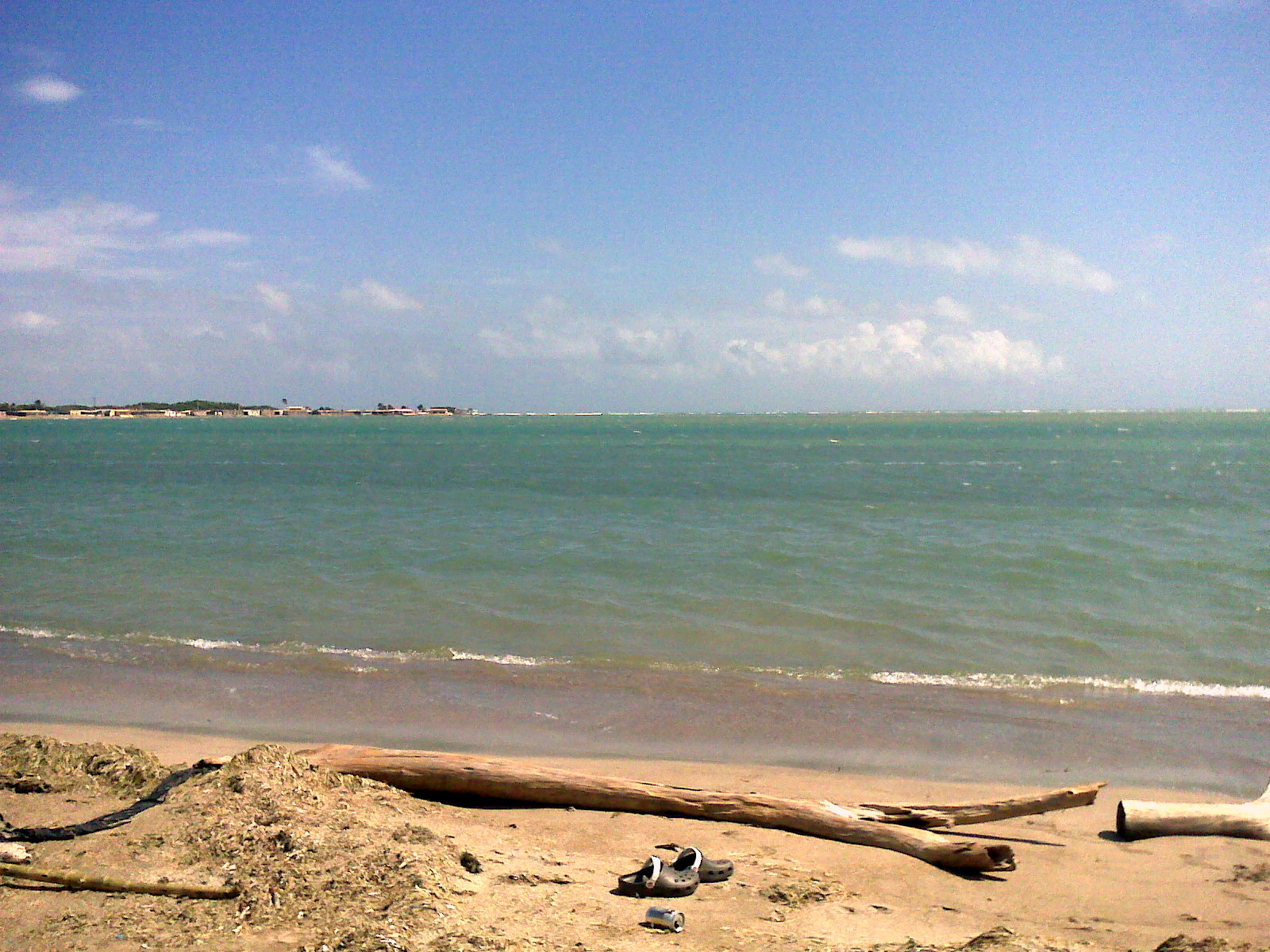 El Supi Península de Paraguana